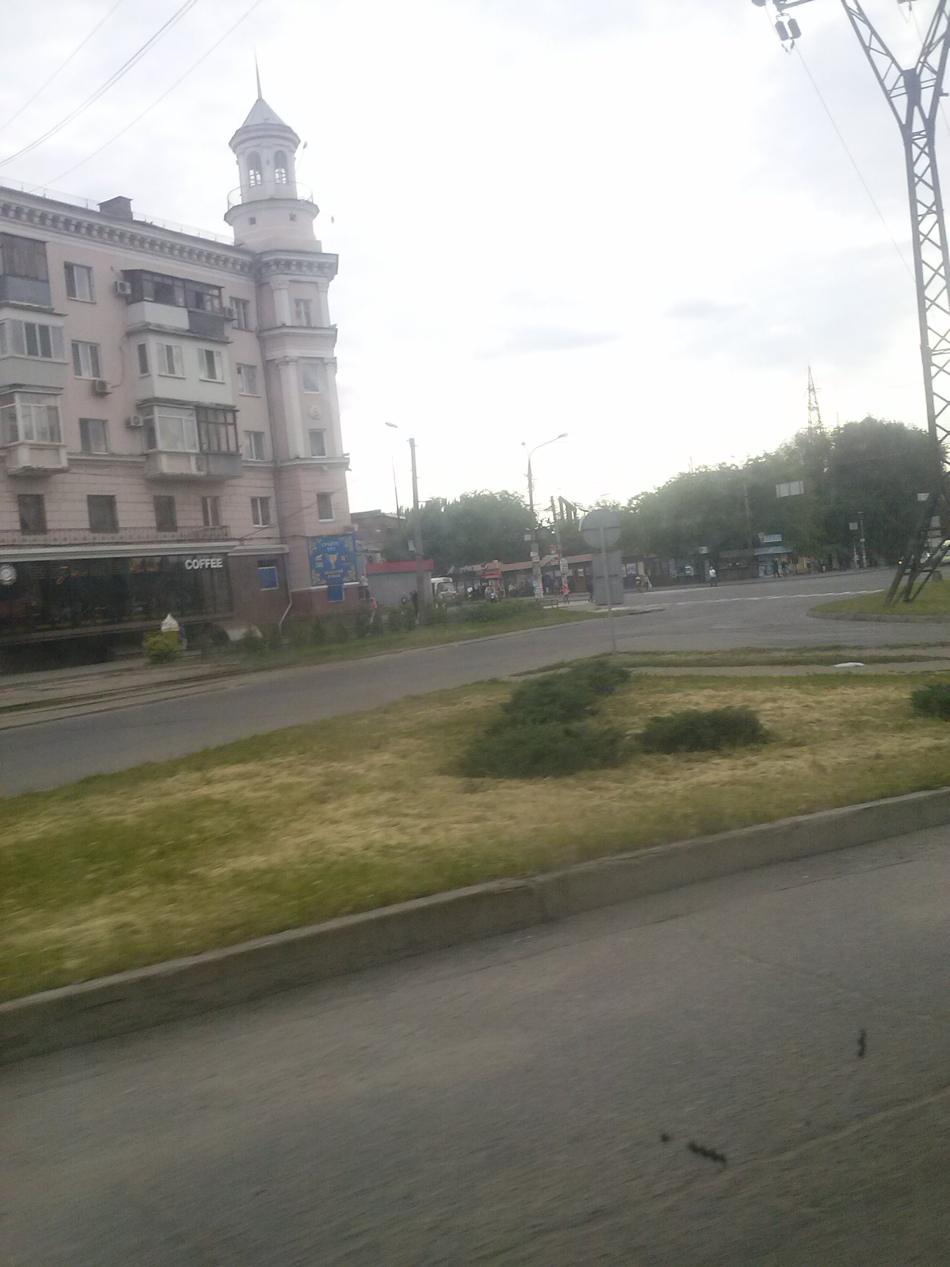 вул. Іванова